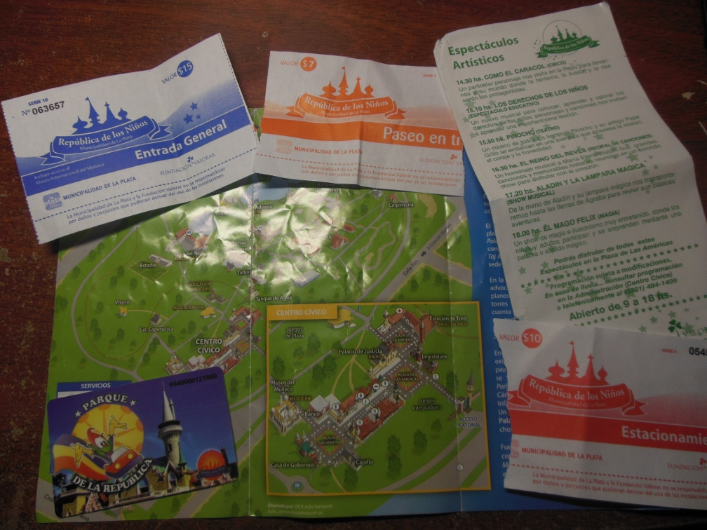 Folletería oficial del parque, donde se observa el mapa, el boleto del tren, la entrada, el estacionamiento y los horarios de las actividades.